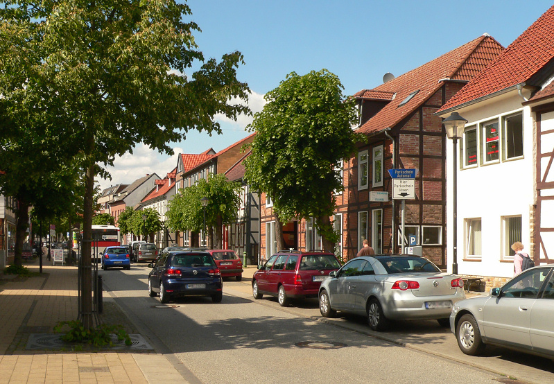 Vorsfelde_Lange_Straße